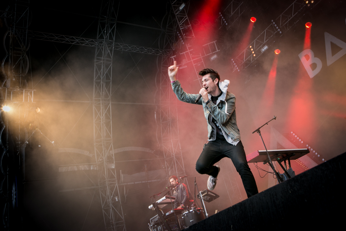 bastille | oasg 2014